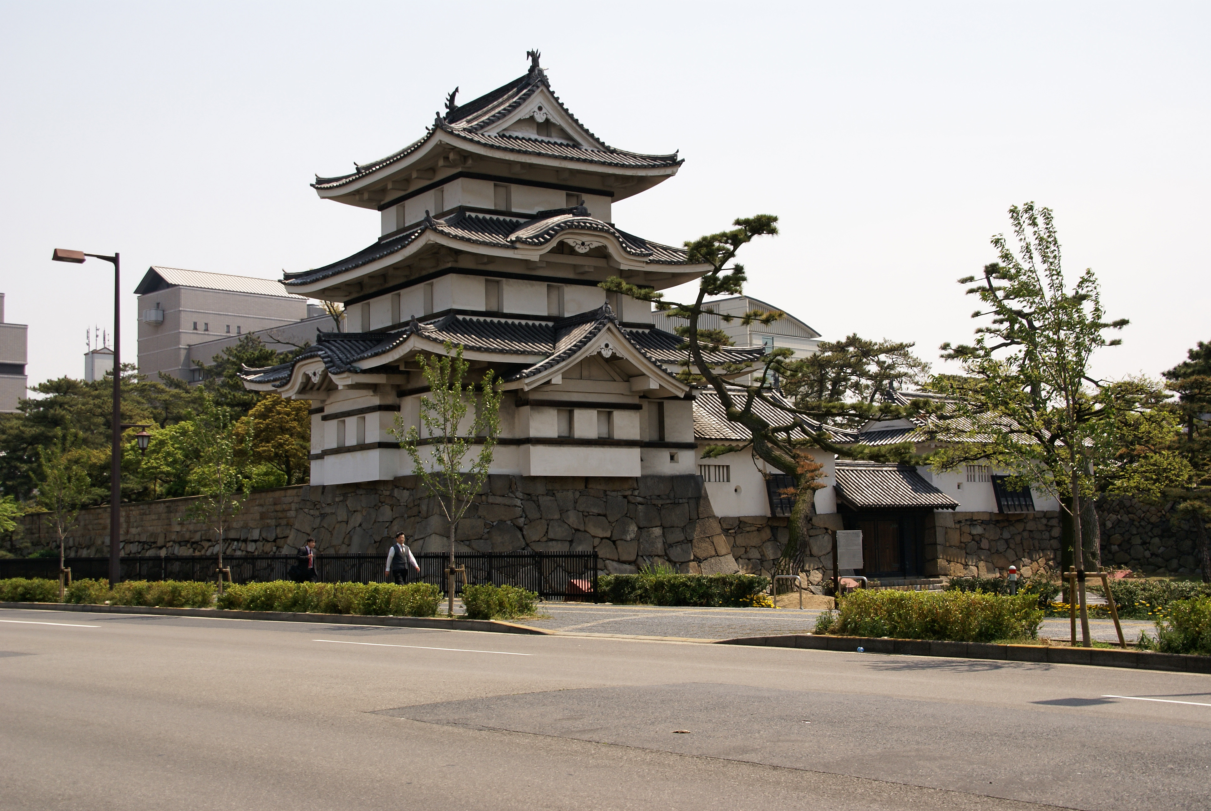 Takamatsu Castle (Tamamo park) in Takamatsu, Kagawa prefecture, Japan